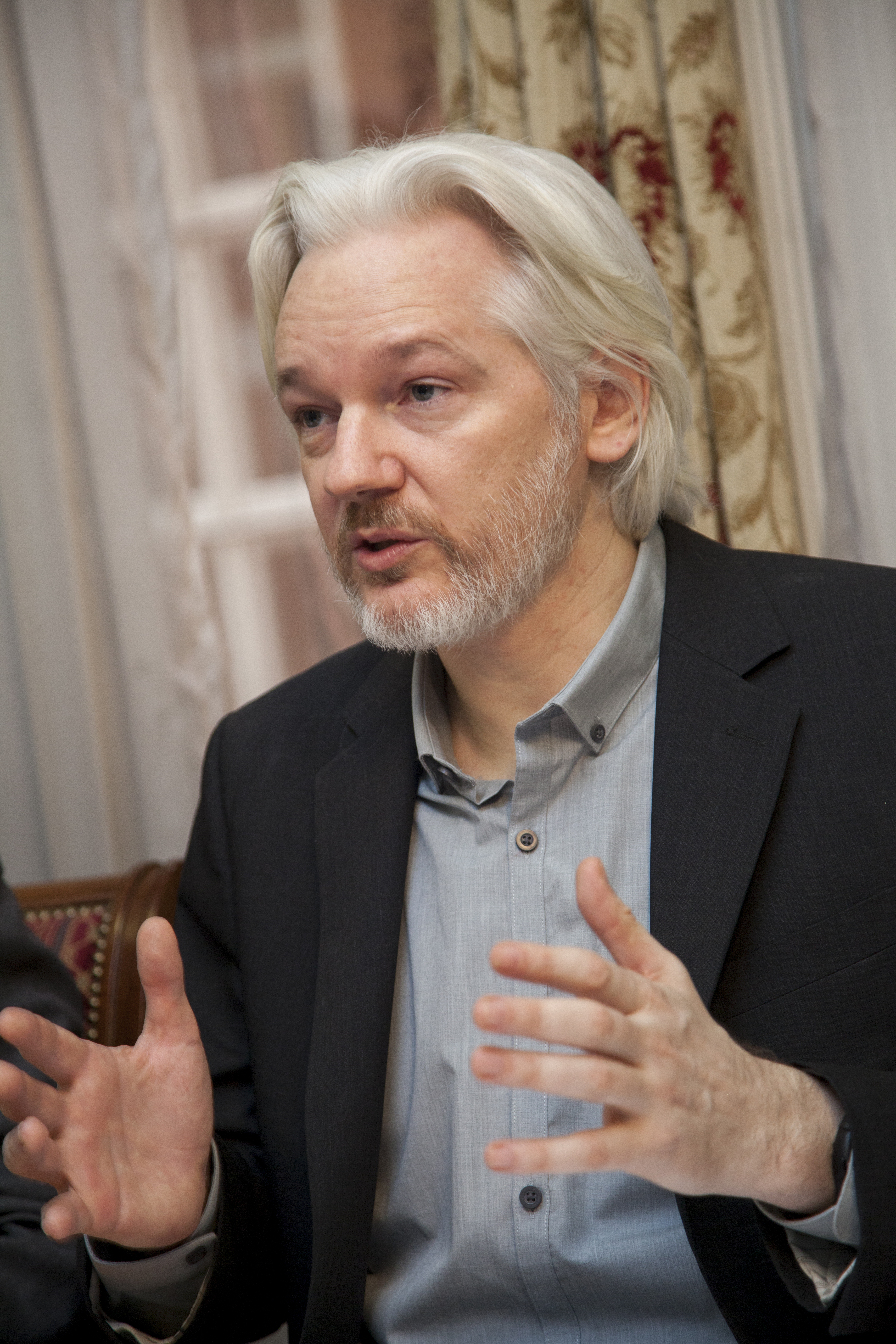 Londres (Reino Unido), 18 de Agosto 2014, Canciller Ricardo Patiño y Julian Assange ofrecieron una rueda de prensa con presencia de medios internacionales. Foto: David G Silvers. Cancillería del Ecuador.